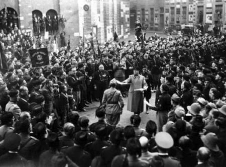 Celebration 'Adunata di Piazza San Sepolcro, date unknown, probably post 1936 considering uniforms of soldiers